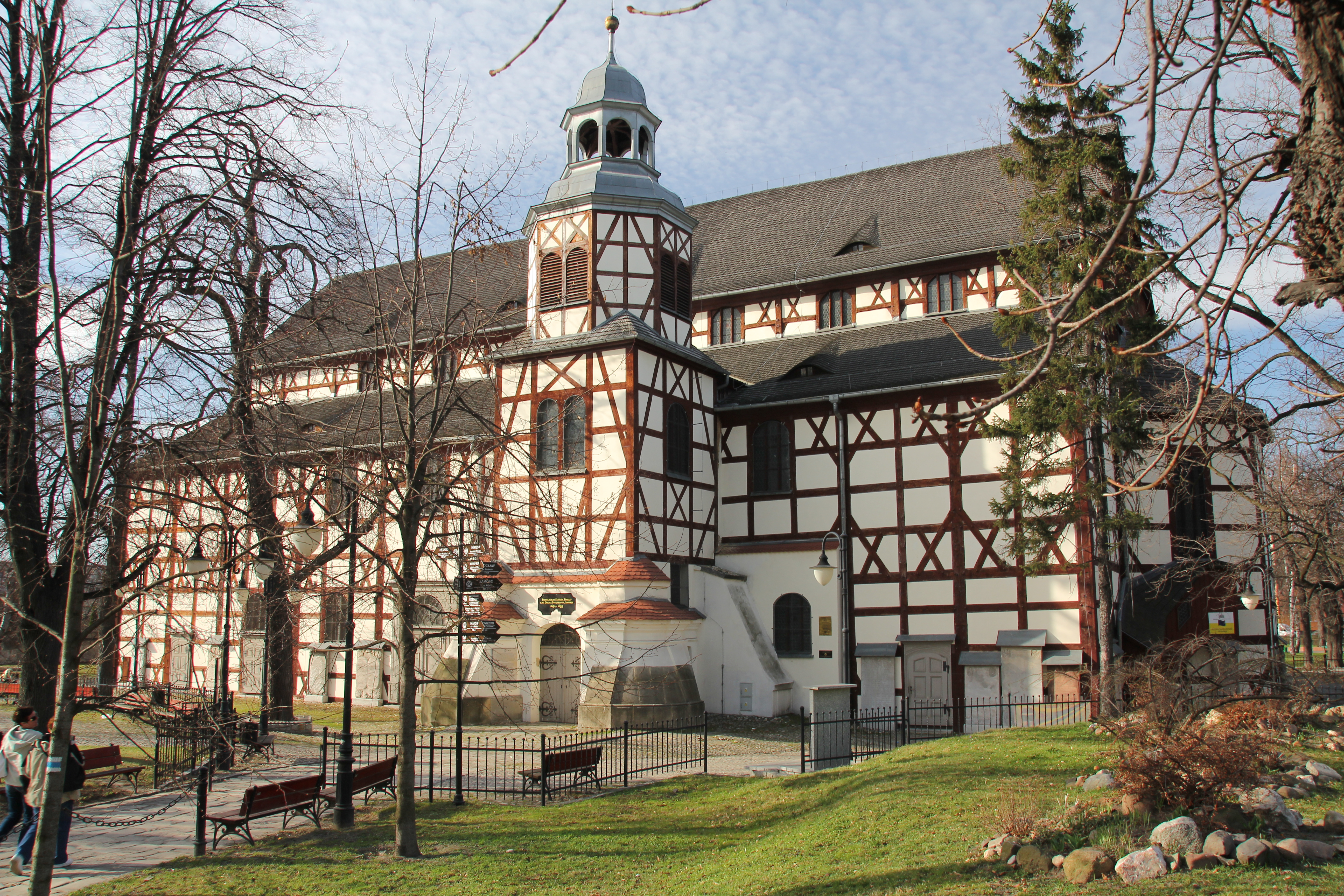 Jawor - zespół kościoła „Pokoju”, ul. Limanowskiego 40 / Park Pokoju: - kościół ewangelicki, szach., 1654-56, 1709, - d. cmentarz przy kościele. ob. park miejski „Park Pokoju”, 2 poł. XVII, 1867, 1970, - dom dzwonnika przy kościele Pokoju, ob. pastorówka parafii ewang.-augsb., szach., ul. Park Pokoju 2, poł. XVII